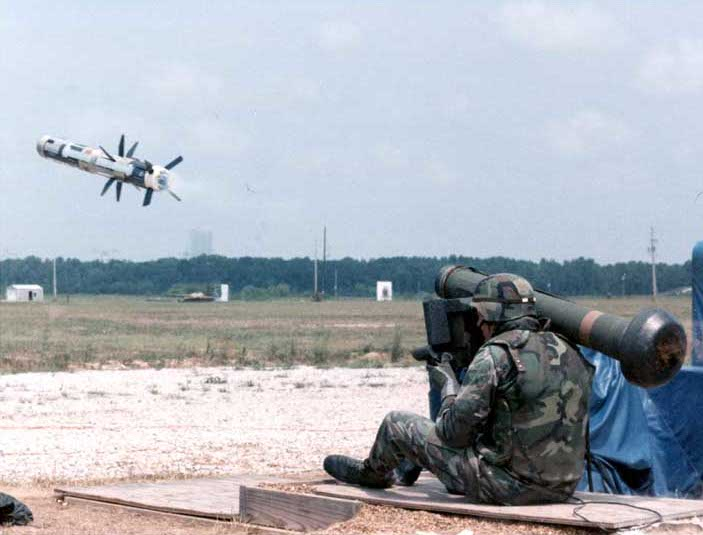 Javelin Lenkwaffe